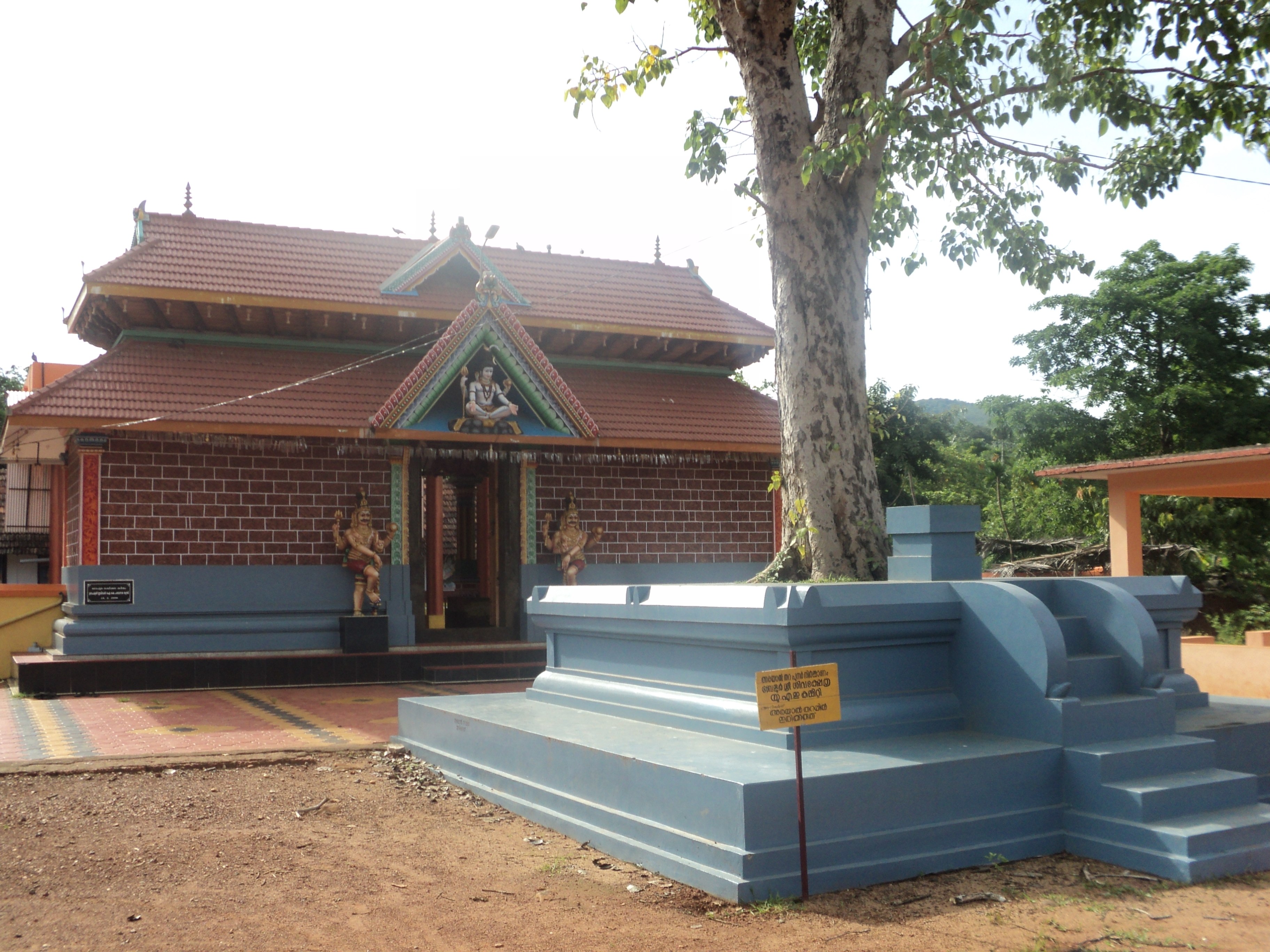 കാസര്‍ഗോഡ് ജില്ലയിലെ കോടോം ബേളൂര്‍ പഞ്ചായത്തില്‍ അട്ടേങ്ങാനത്ത് സ്ഥിതിചെയ്യുന്ന ശിവക്ഷേത്രത്തിനു മുന്നിലുള്ള നടപ്പന്തലും അരയാല്‍ മരവും